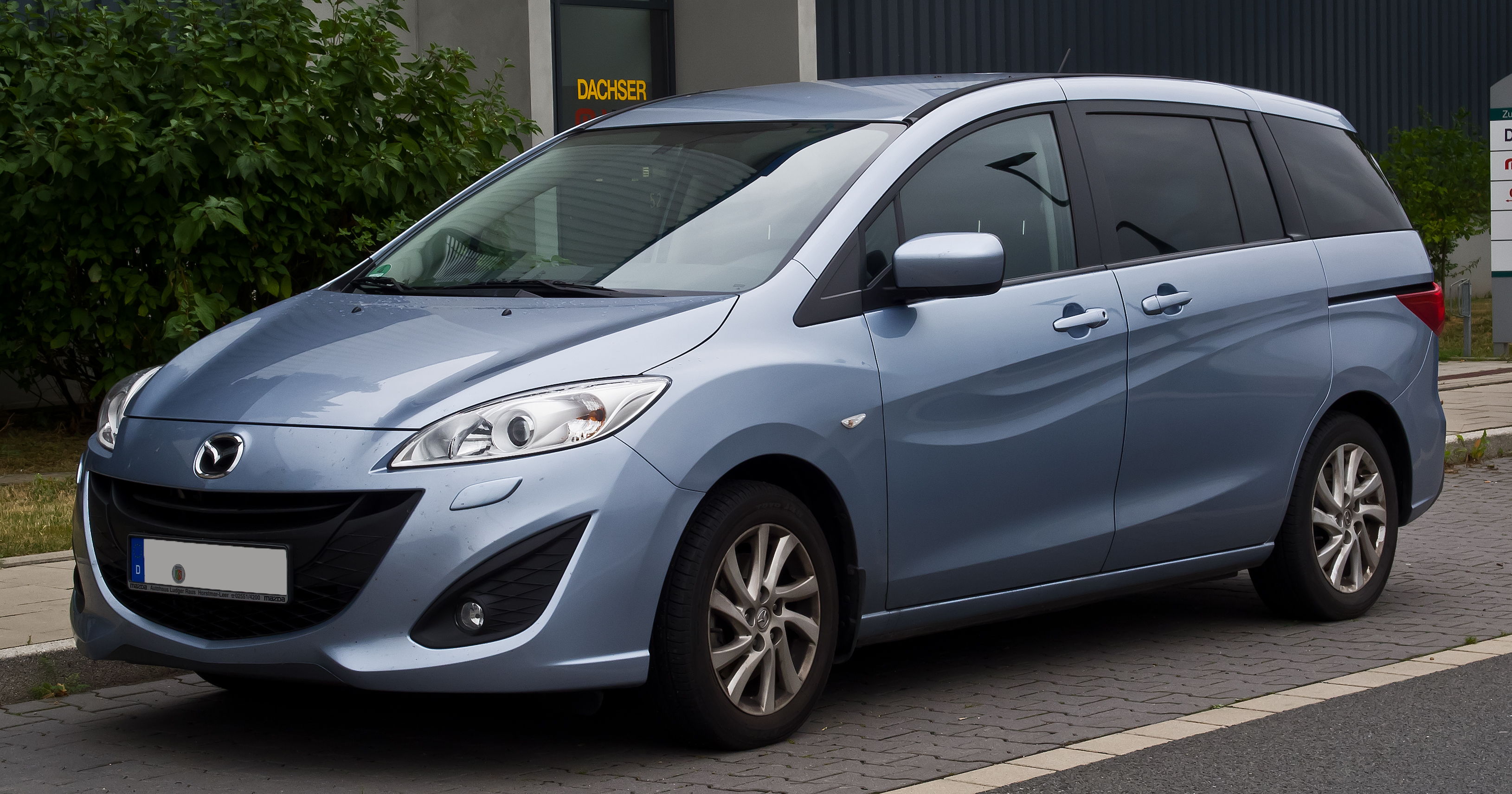 Mazda5 (II)